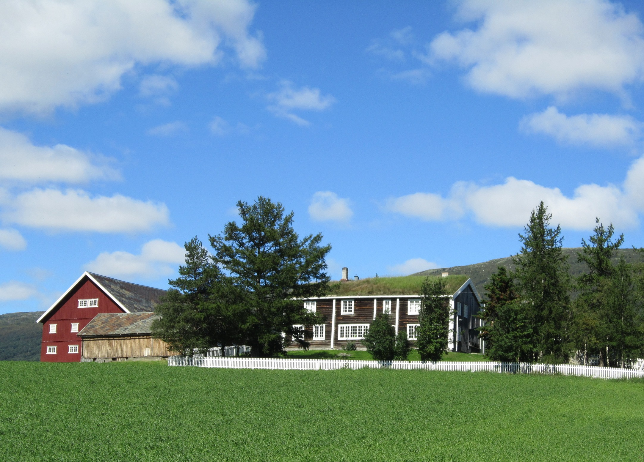 Hov prestegård, Lesja